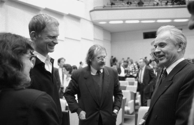 Berlin, 16. Volkskammertagung ADN-ZB Senft 5.2.90 Berlin: 16. Volkskammer-Tagung Künftig werden 13 Parteien und Gruppierungen der DDR an einer Regierung der nationalen Verantwortung beteiligt sein. So sieht es der Vorschlag vor, den Ministerpräsident Dr. Hans Modrow (r) der Volkskammer unterbreitete. (v. l. n. r.: Tatjana Böhm, Unanhängiger Frauenverband, Klaus Schlüter, Grüne Liga, Gerd Poppe, Initiative Frieden und Menschenrechte). Abgebildete Personen: Modrow, Hans Dr.: Ministerpräsident, Mitglied des Zentralkomitees (ZK) der SED, DDR (GND 118906925) Poppe, Gerd: 1990 Volkskammerabgeordneter, DDR (GND 133908860) Böhm, Tatjana: 1990 Ministerin, Unabhängiger Frauenverband, DDR Schlüter, Klaus: 1990 Vertreter der Grünen Liga am Runden Tisch, DDR